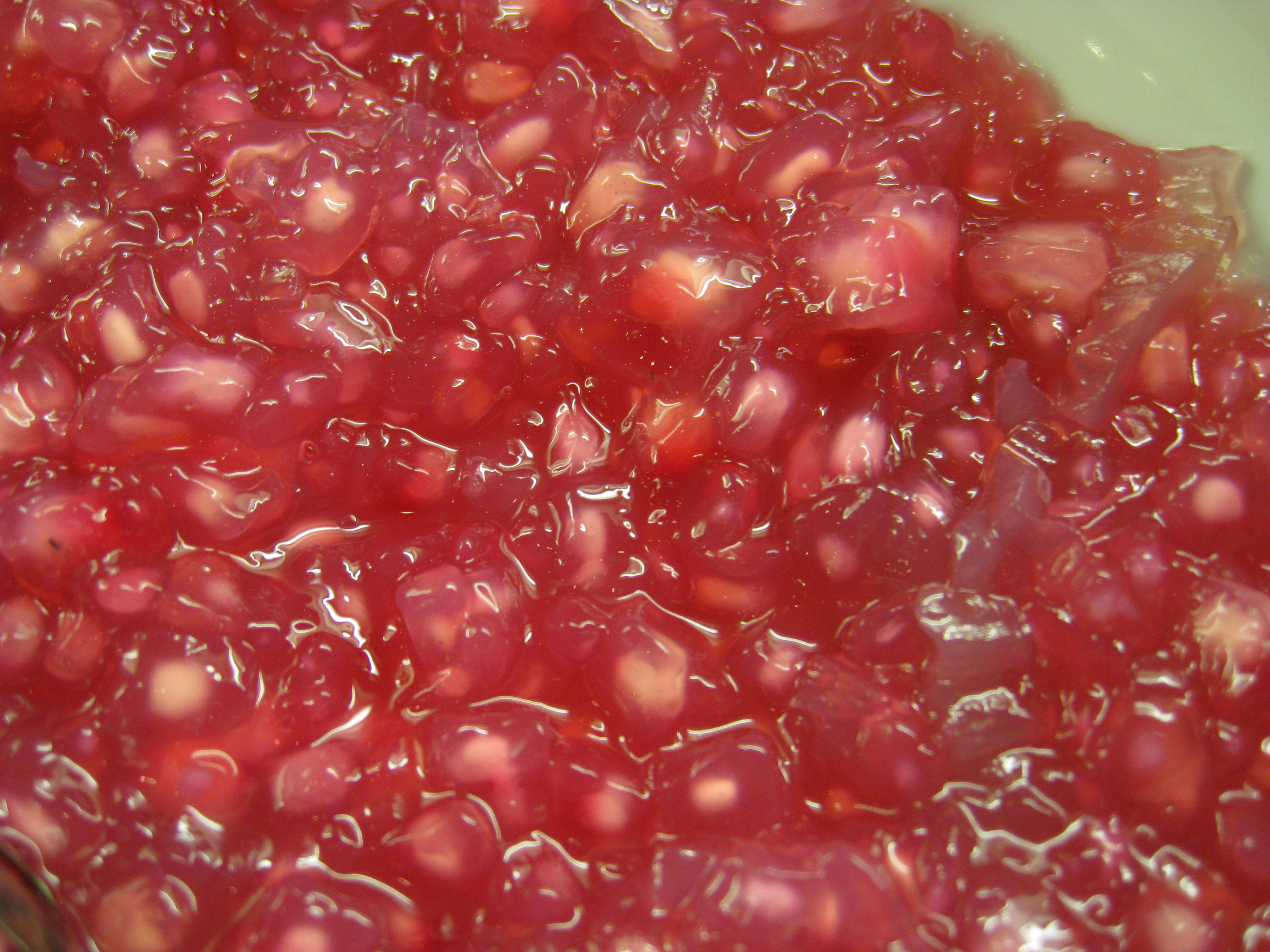 Hạt lựu dùng trong các món chè.